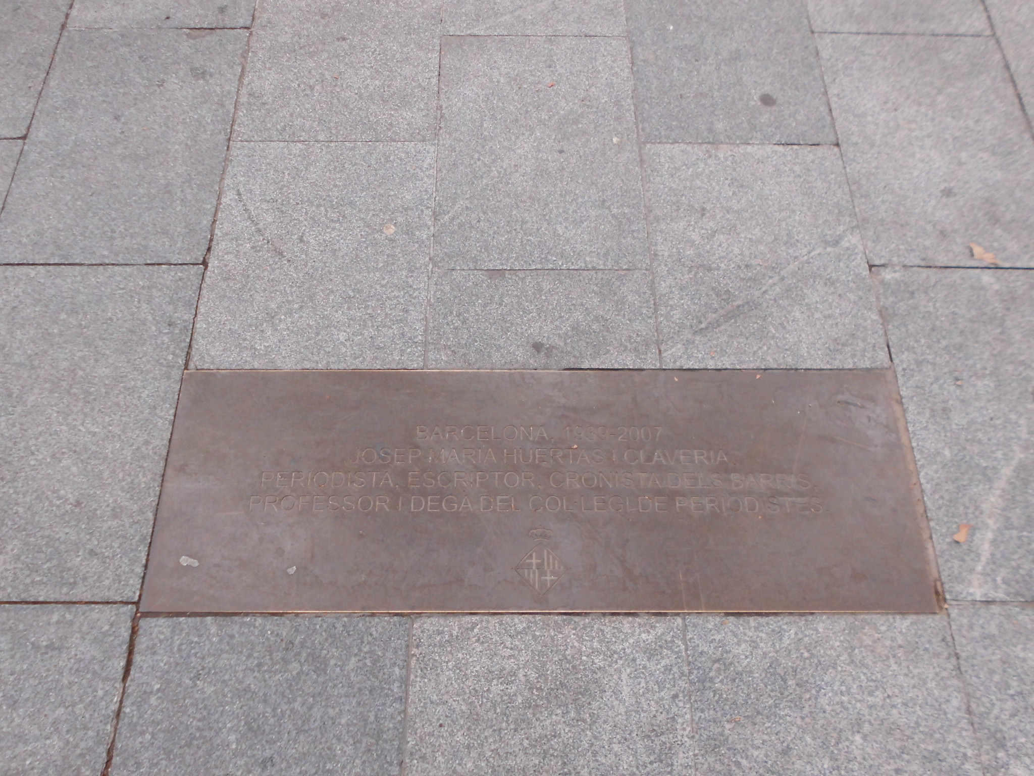 Josep M. Huertas. Rambla del Poblenou amb c. Doctor Trueta (Barcelona)